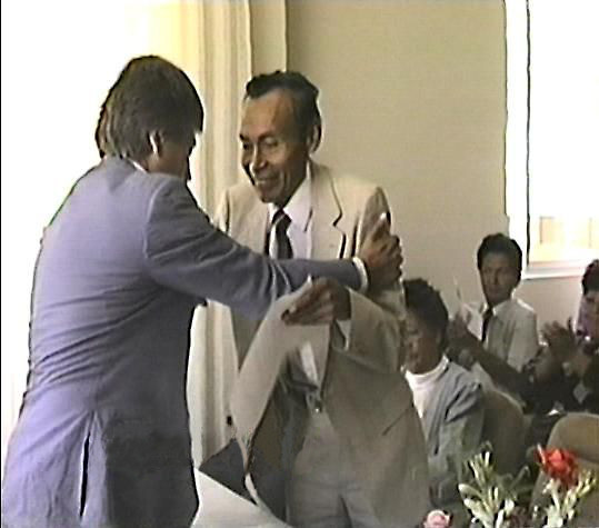 Ceremonia de reconocimiento de parte de la Asamblea Nacional de rectores a la labor del Dr. Ruben Castillo Anchapuri. En la foto se observa al Presidente de la ANR Dr. Javier Sota Nadal entregando la resolucion respectiva. Esta foto fue extraida del video de dicha ceremonia